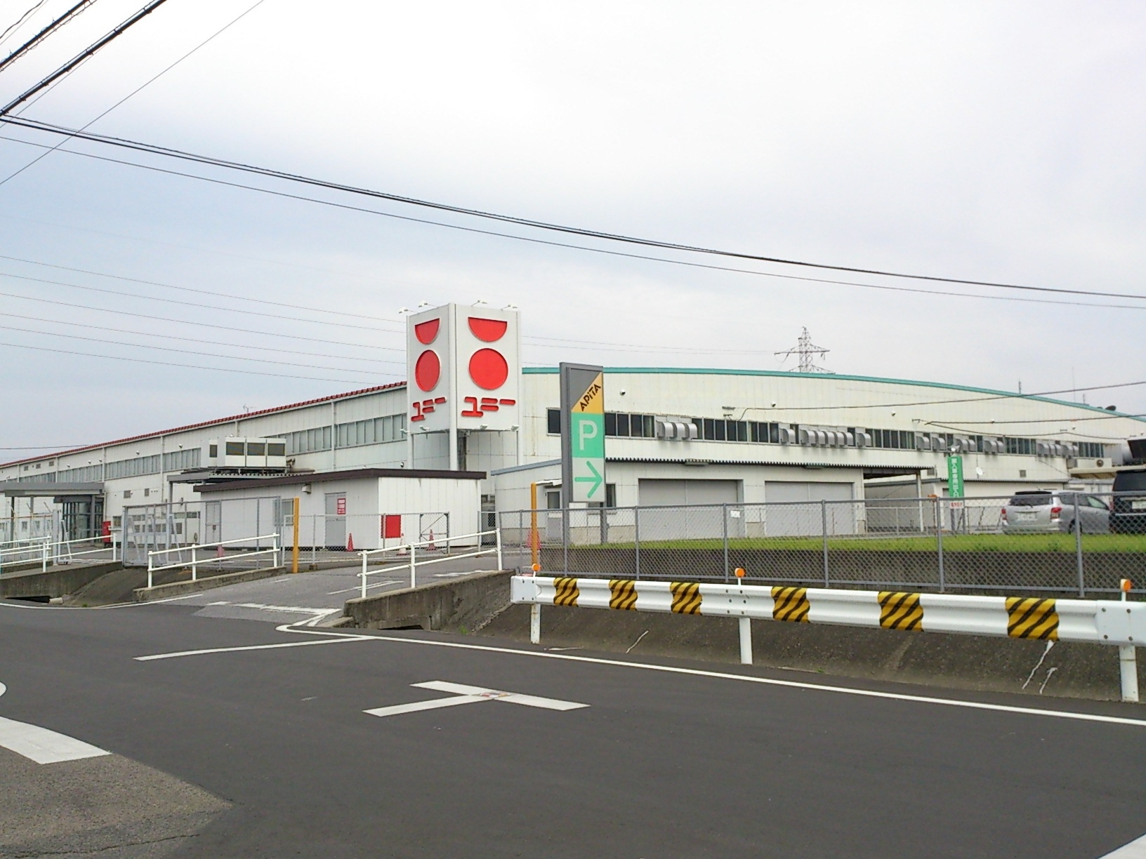 ユニー本部